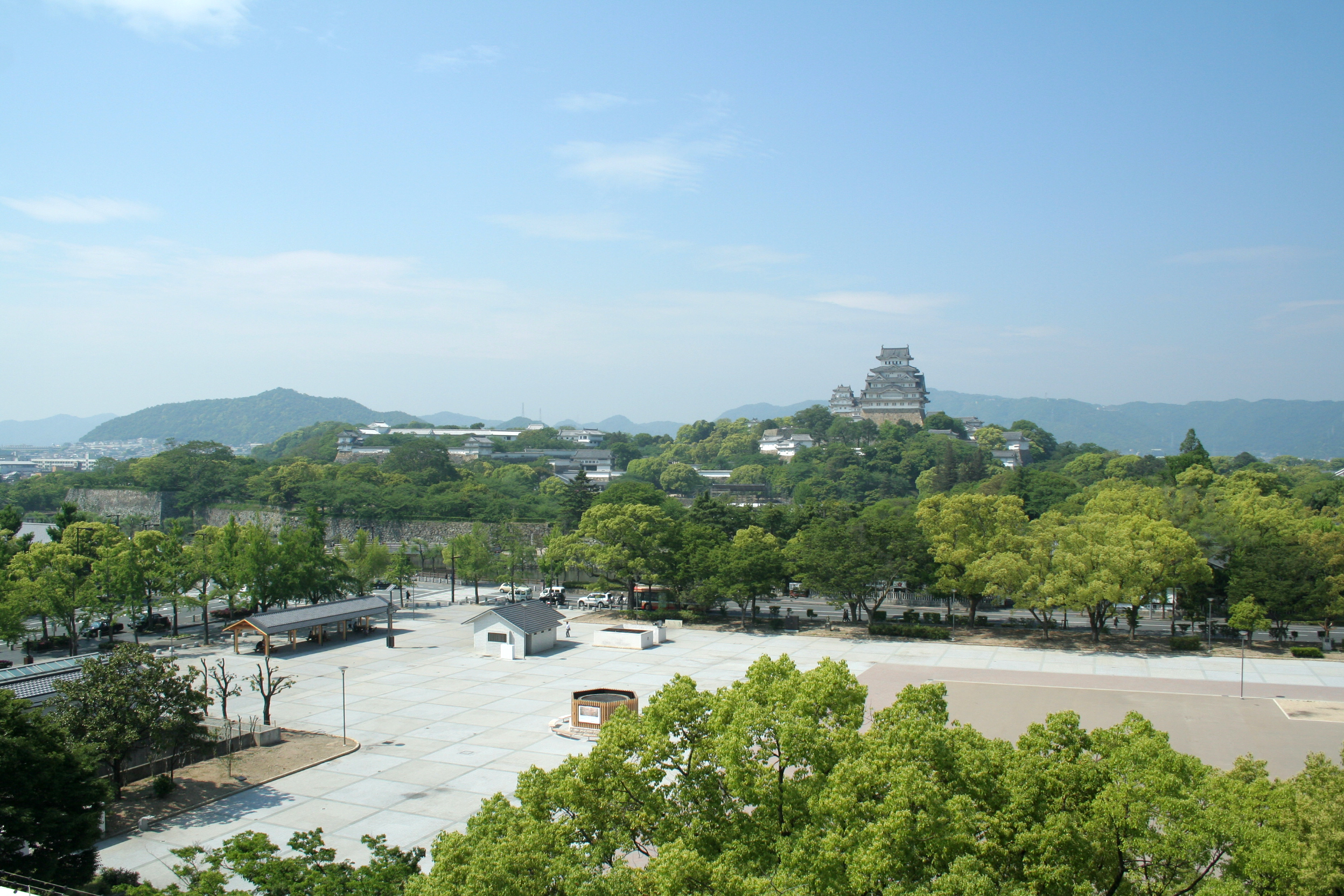 姫路市内で撮影した写真。 イーグレ姫路屋上展望台より見た姫路城。